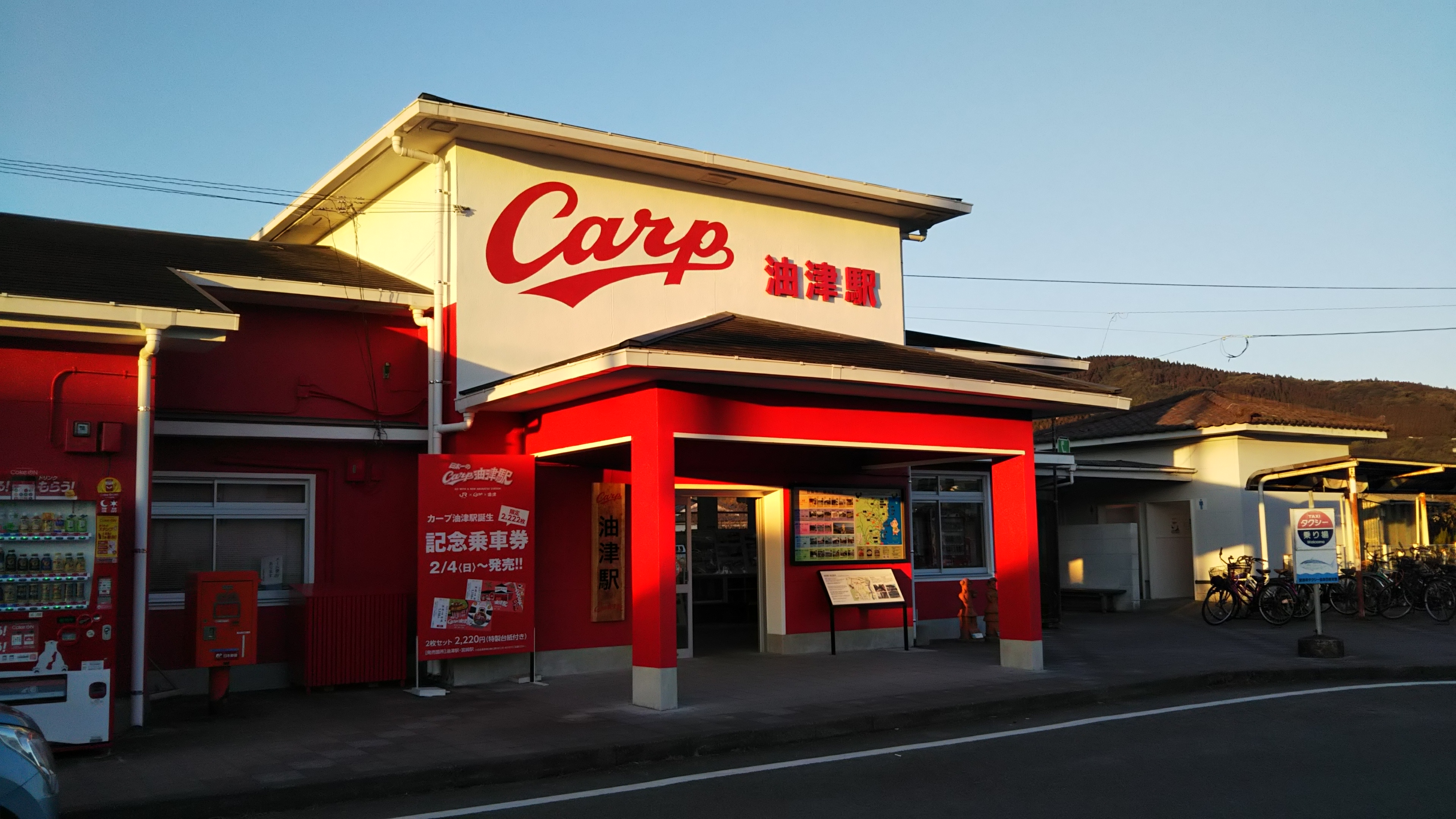 駅舎を赤く塗り替え愛称「カープ油津駅」となった